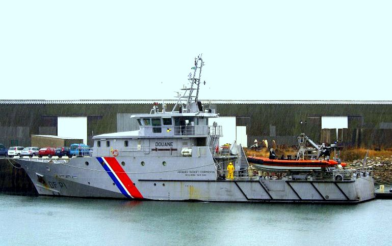 Le patrouilleur garde-côtes français : Jacques Oudart Fourmentin. Basé au port de Boulogne-sur-Mer